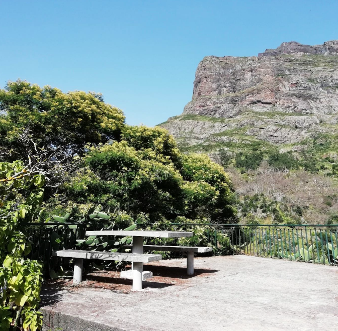 Faja escura banco